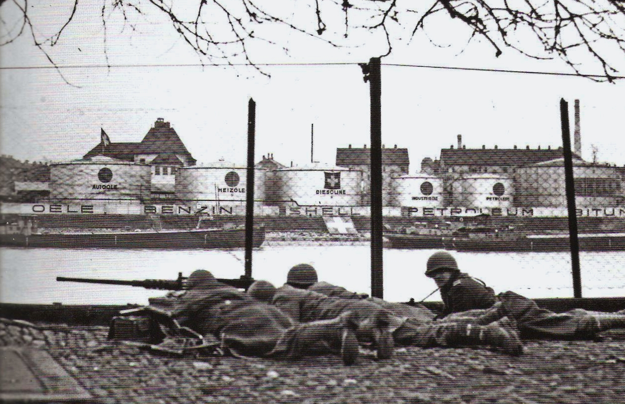 Truppe francesi al Reno nel novembre 1944 (la fonte viene indicata come NARA)